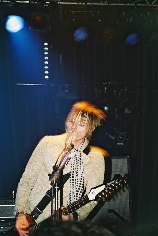 Queen Adreena en concert au Big Band Café, Caen/Hérouville Saint-Clair